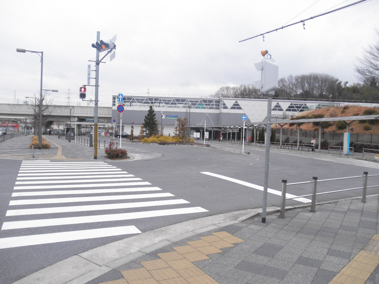 学研北生駒駅